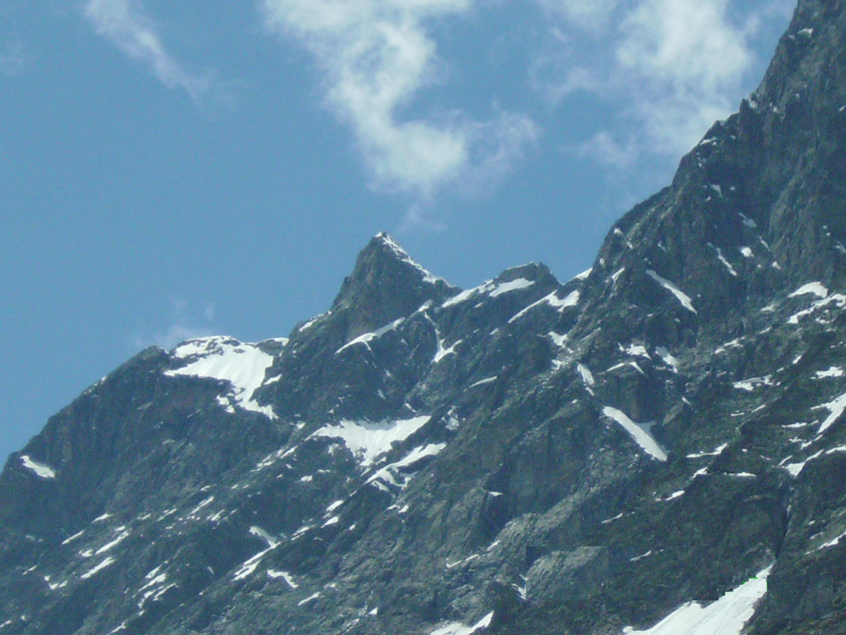 La Becca di Guin dal versante sud-est